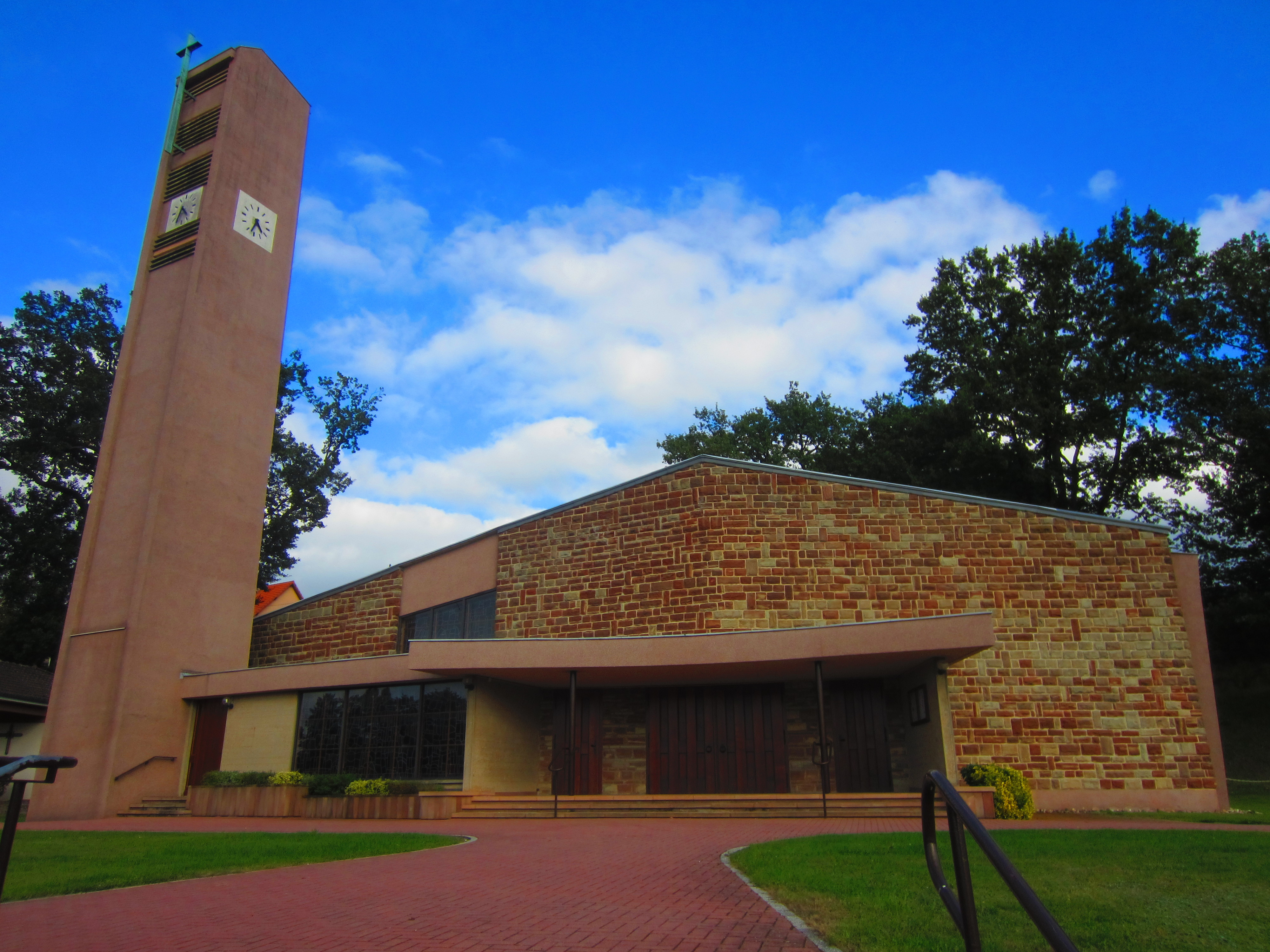 Eglise Diesen